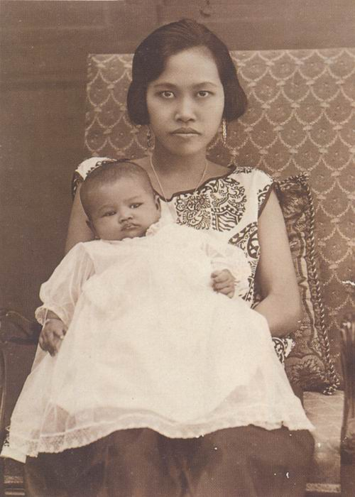 พระนางเจ้าสุวัทนา พระวรราชเทวี ประทับบนพระเก้าอี้ และทรงอุ้มสมเด็จพระเจ้าภคินีเธอ เจ้าฟ้าเพชรรัตนราชสุดา สิริโสภาพัณณวดี พระราชธิดาในรัชกาลที่ 6